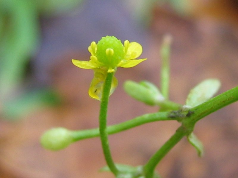 Blüte eines Gift-Hahnenfußes Ranunculus sceleratus